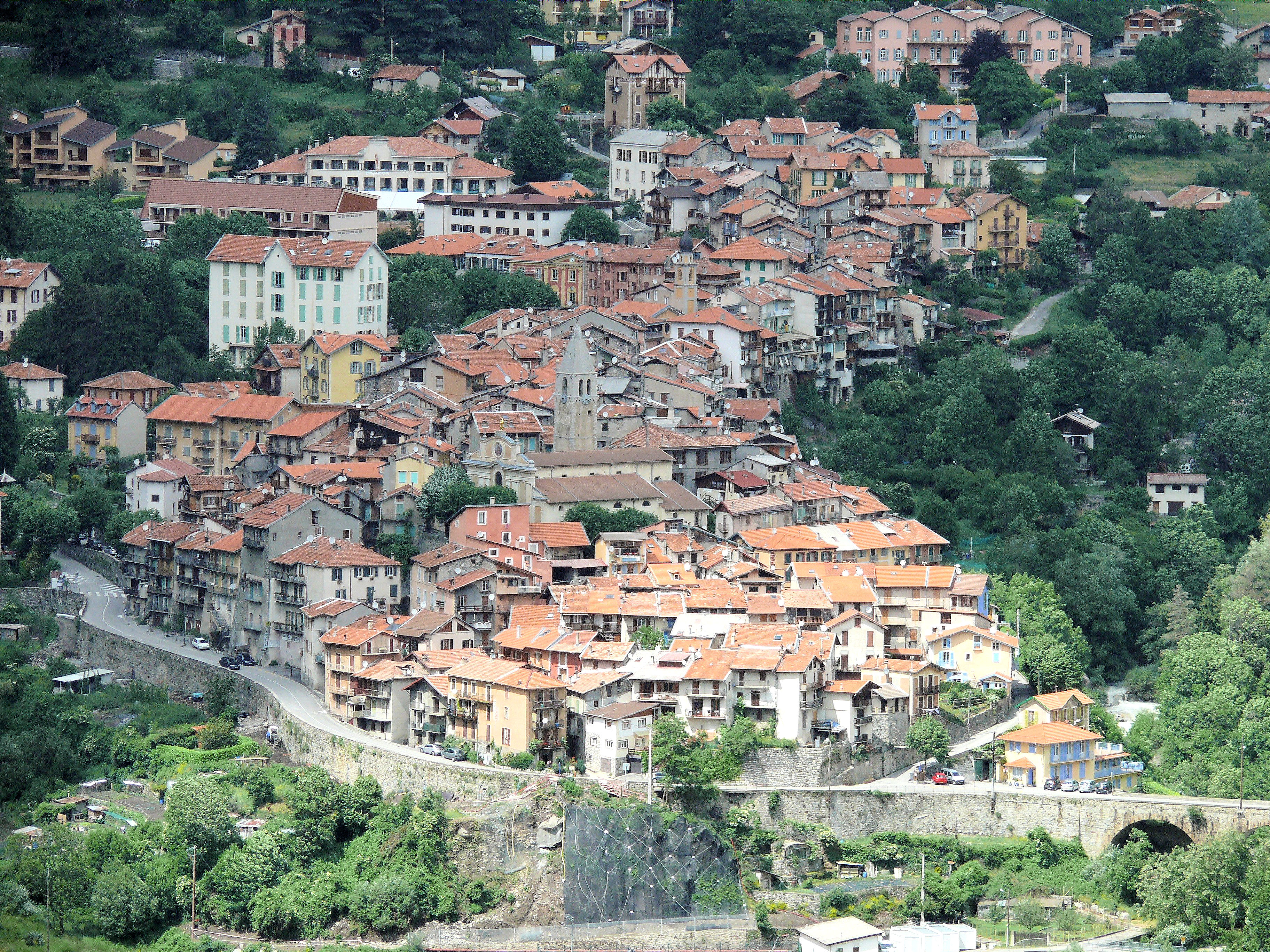 Saint-Martin-Vésubie vu de la route de Venanson